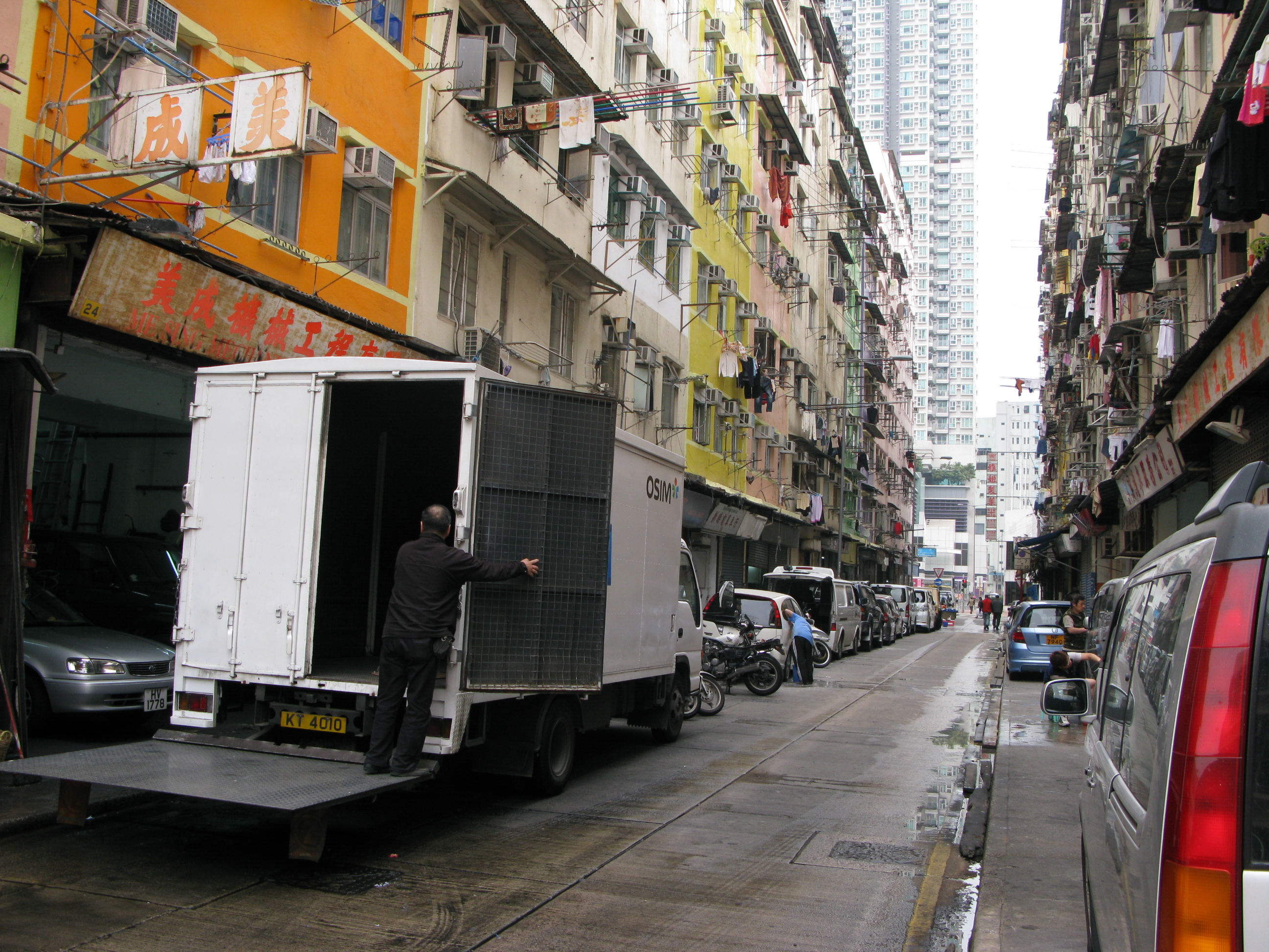 中文（香港）: 香港九龍土瓜灣鶴齡街